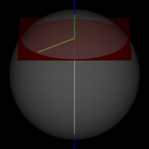 Blochsphäre